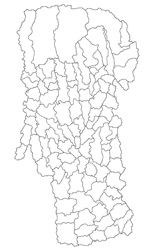 Categorie:Hărţi ale judeţului Argeş